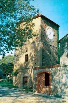 Fotografía Torre del Reloj de Noreña